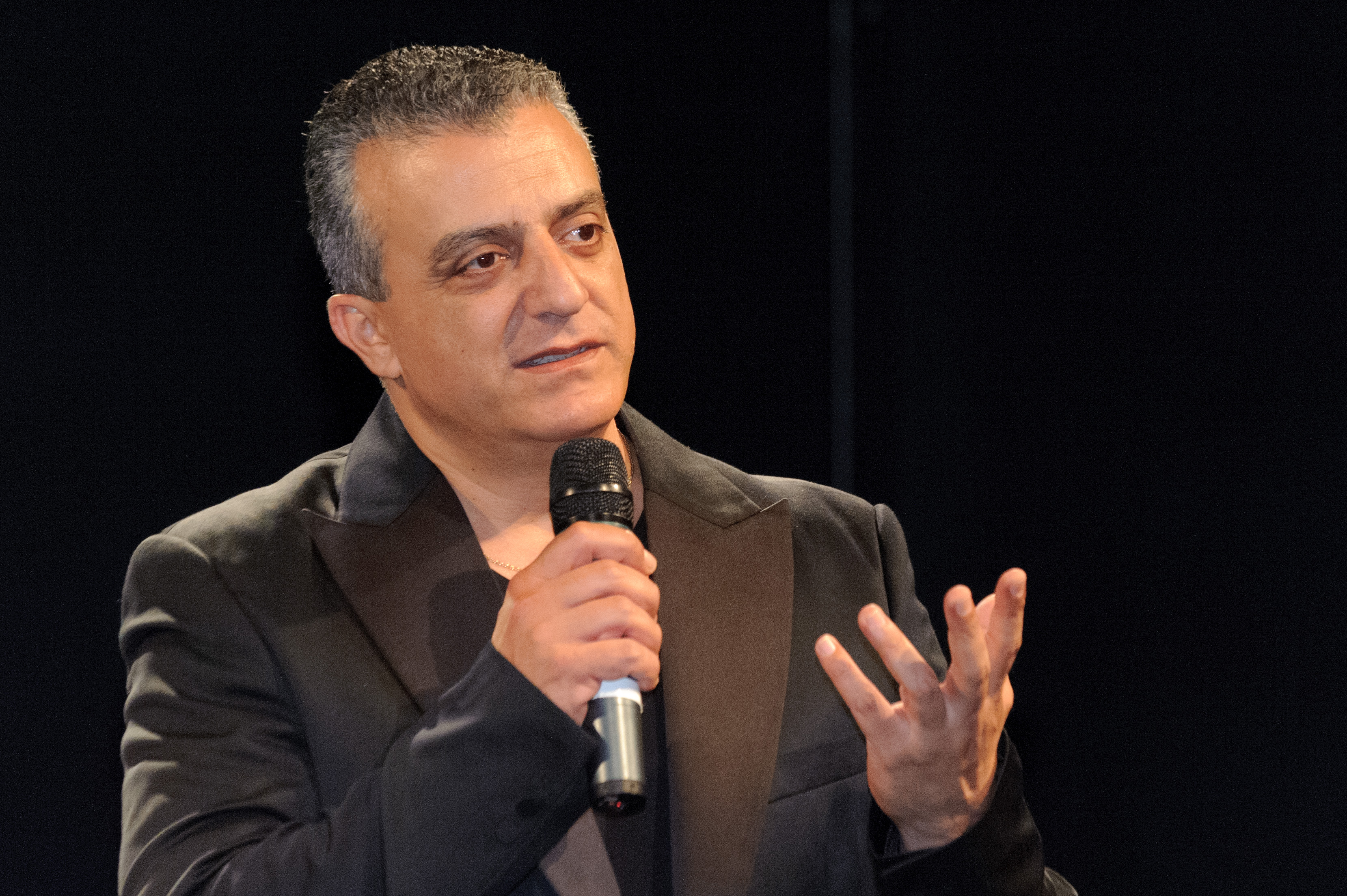 Norman Issa, (Schauspieler, Israel, Hauptdarsteller der Serie Arab Labor) Die deutsch-israelischen Literaturtage - organisiert vom Goethe-Institut und der Heinrich-Böll-Stiftung - finden seit sechs Jahren abwechselnd in Berlin und in Tel Aviv statt. Neben Lesungen und Diskussionen gibt es im April auch Filme zu sehen. Abgeschlossen wird *beziehungsweise(n)* durch eine Diskussionsrunde, in der Aktivist/innen, Journalist/innen und Autor/innen über den Begriff der Solidarität, über gesellschaftliche Vorstellungen des Zusammenhalts und der sozialen Gerechtigkeit debattieren. Foto: Stephan Roehl